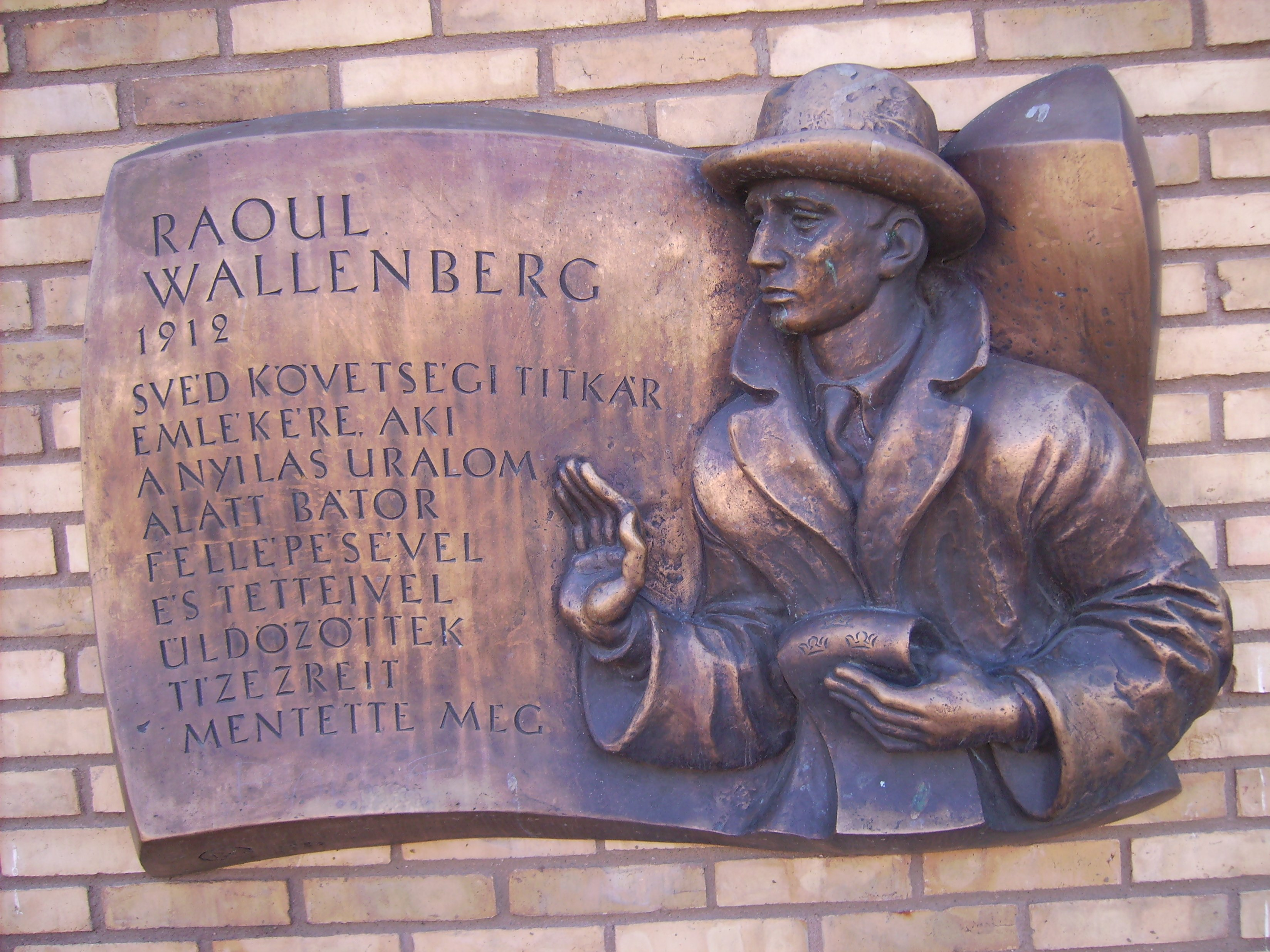 Raoul Wallenbergs plats i Linköping